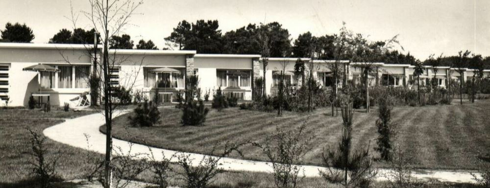 Le Touquet-Paris-Plage - Motel